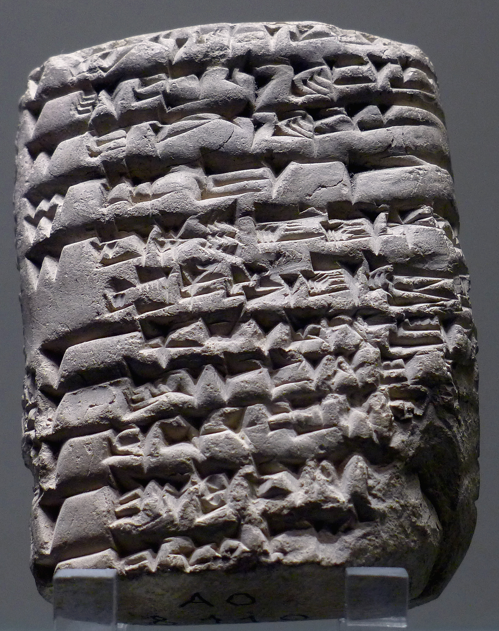 Liste d’objets (mobilier et denrées) appartenant au trésor du temple. Provenance : Tello, anciennement Gursu.